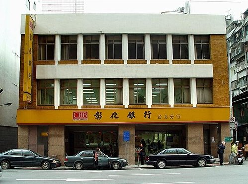 中文（台灣）: 彰化銀行台北分行正面。C君攝影，Winertai已獲授權上載。